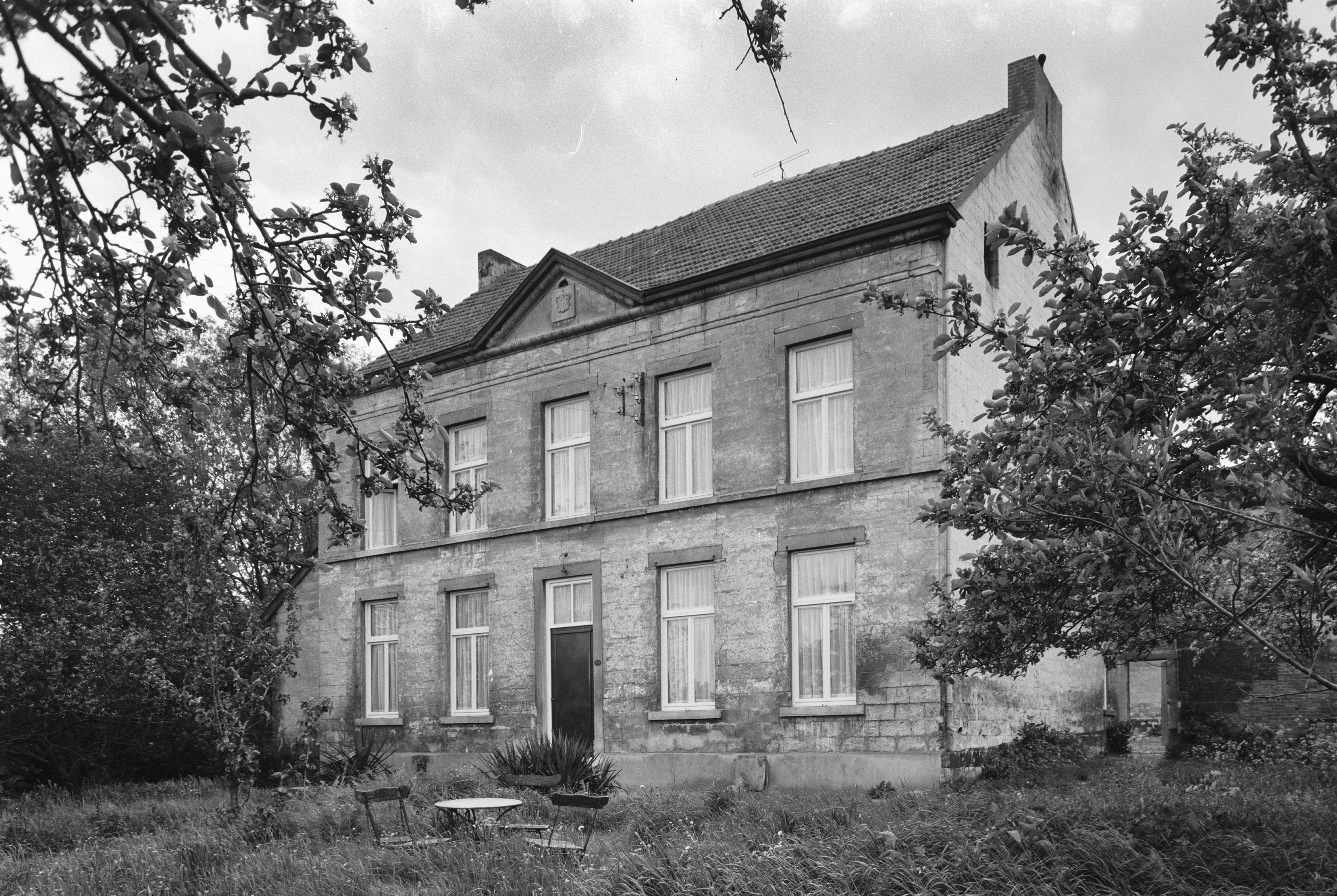 Hoeve Zonneberg, voor